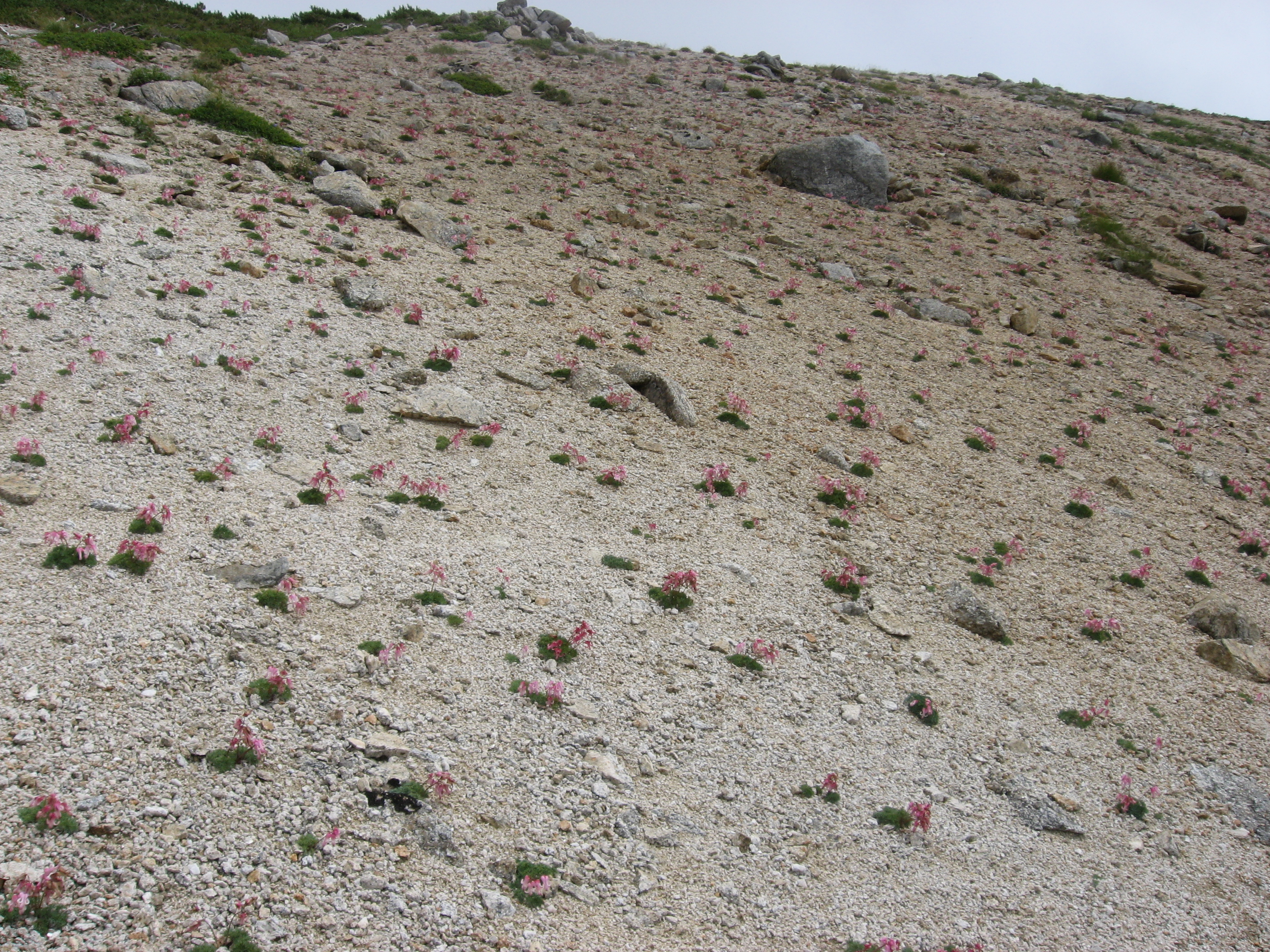 コマクサ (Dicentra peregrina)